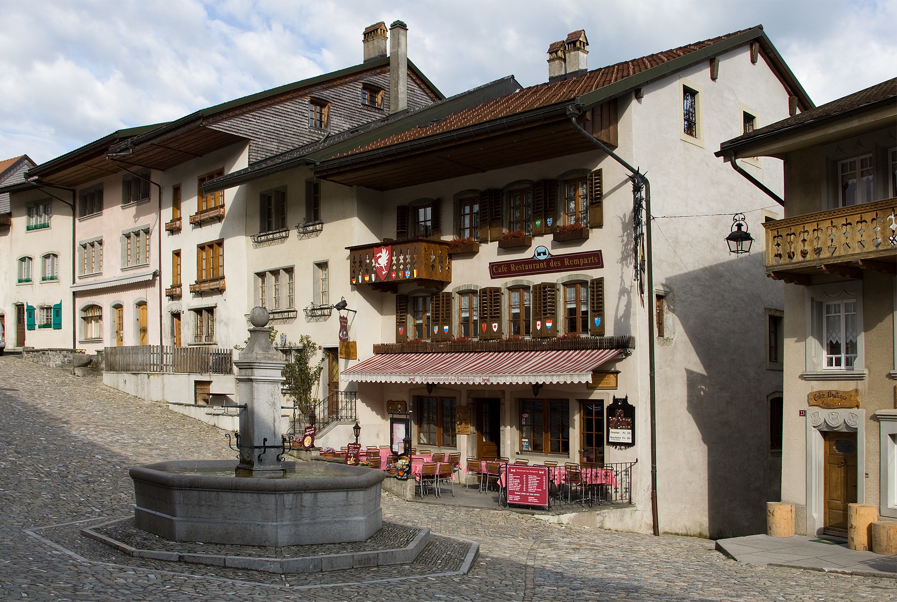 Greyerz